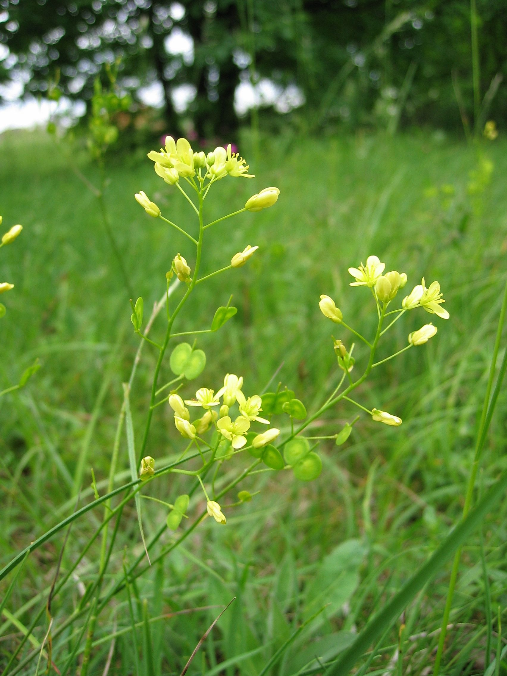 Biscutella laevigata NSG Near Wels, Upper Austria, Austria